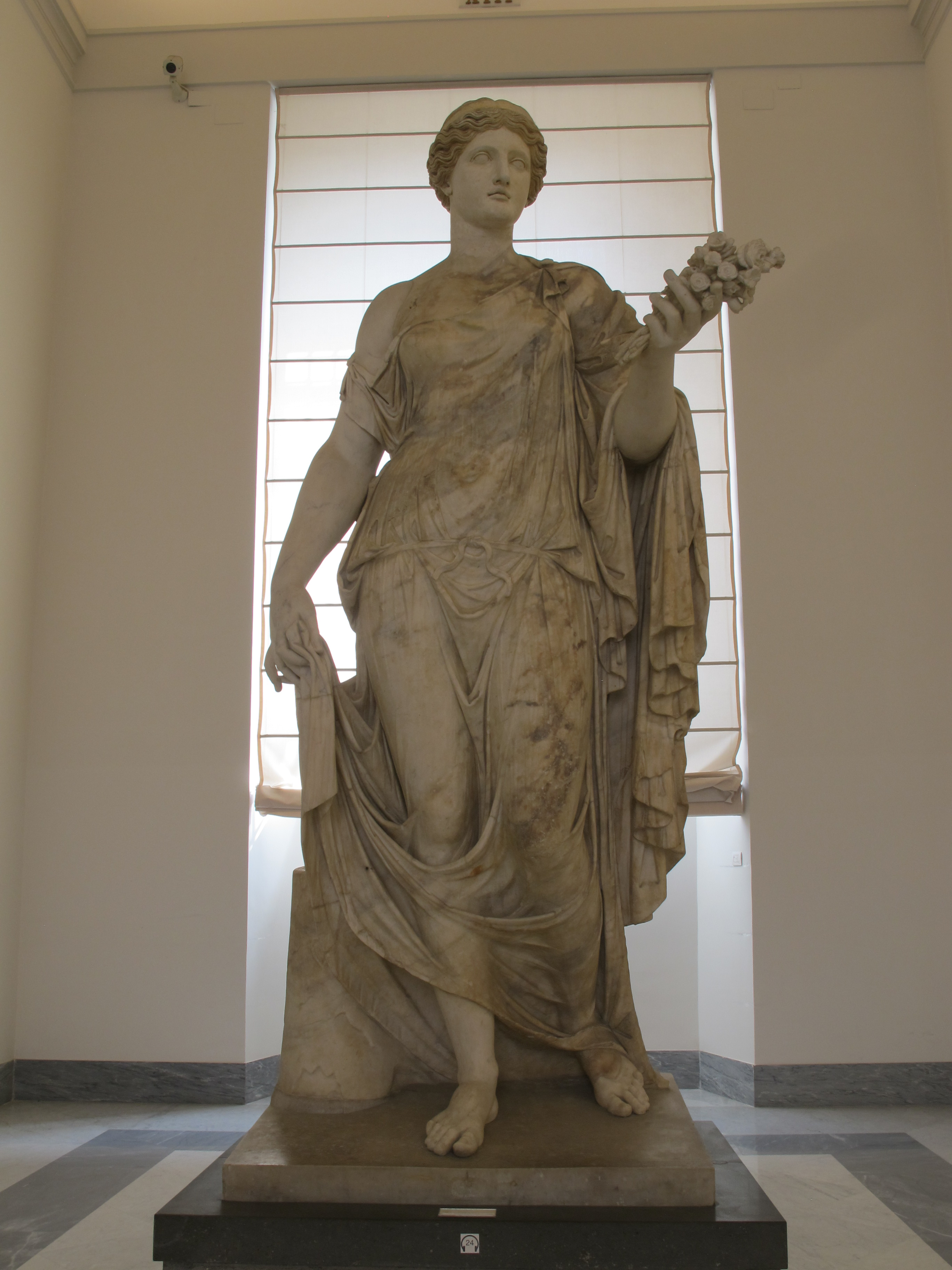 Flora Farnese (Museo archeologico nazionale di Napoli).